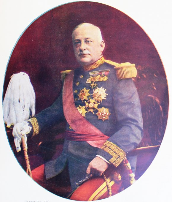 Retrato del general y dictador español Miguel Primo de Rivera (1870-1930).